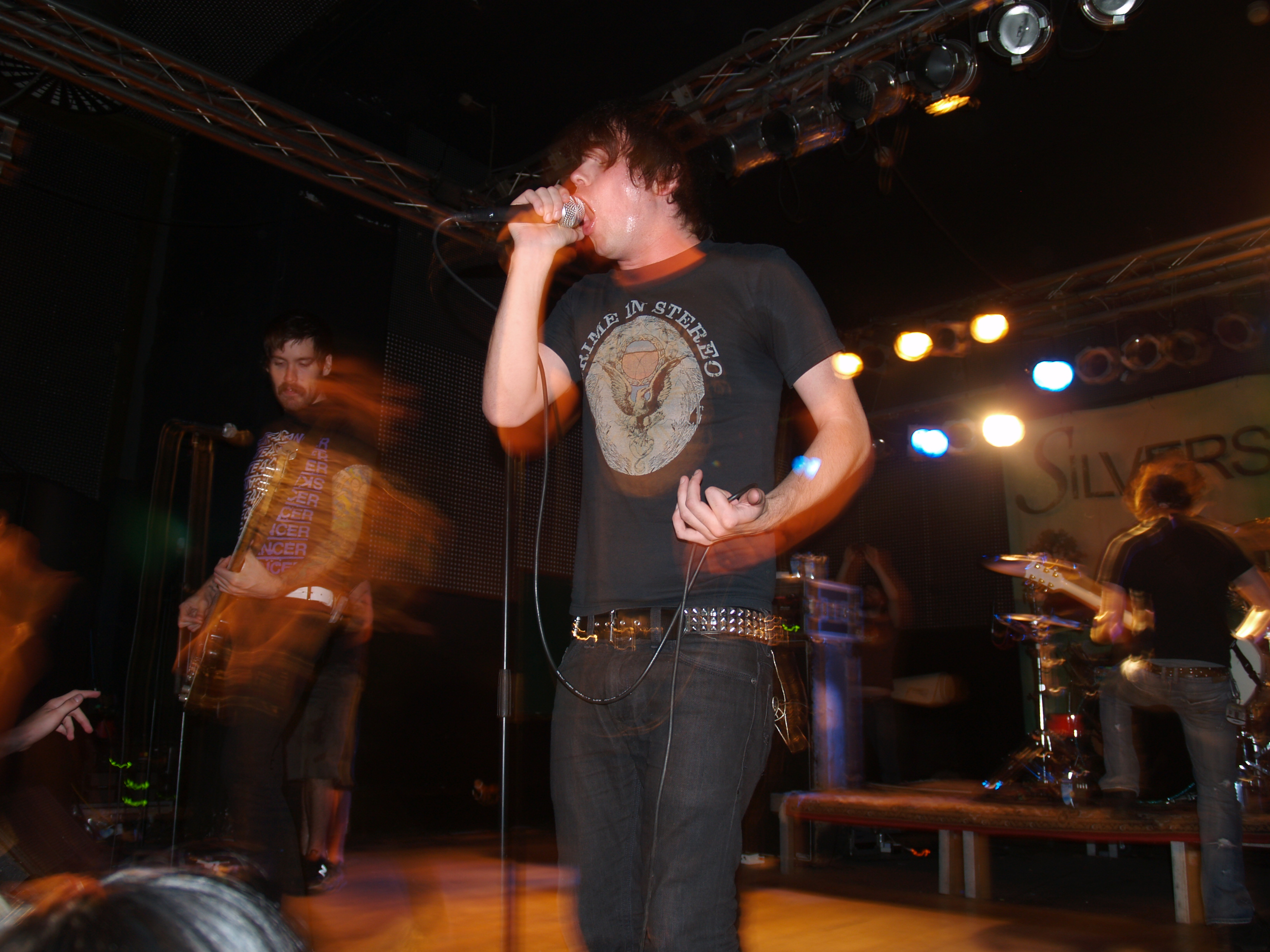 Silverstein (Live at Chemnitz, Germany)